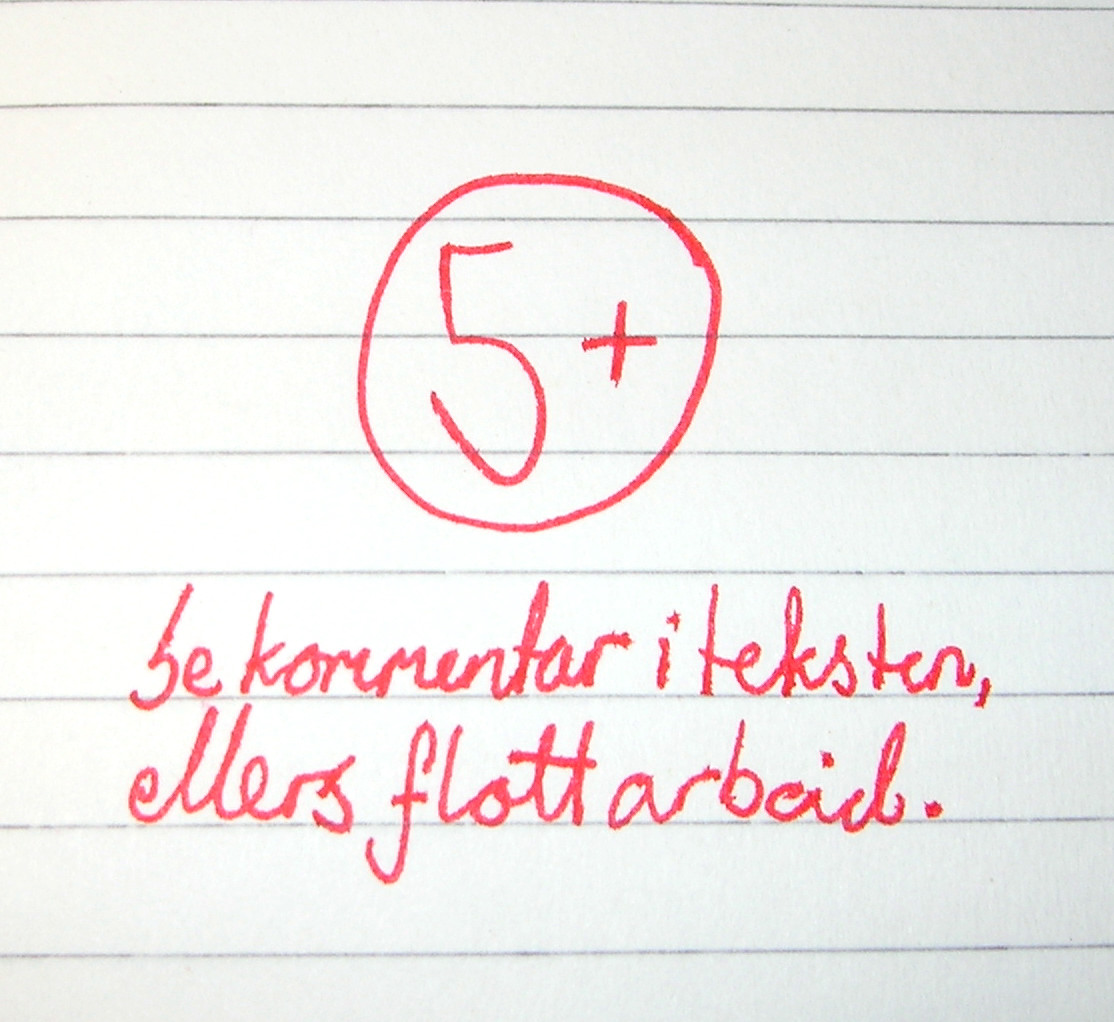 En norsk karakter satt på ungdomsskolen (A Norwegian mark) Norwegian grade in education